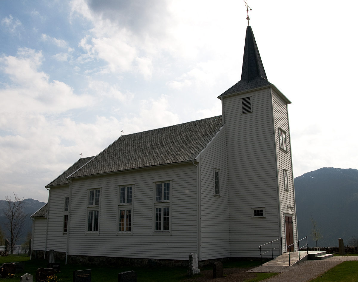 Ivesdal Kapell i Bjerkreim